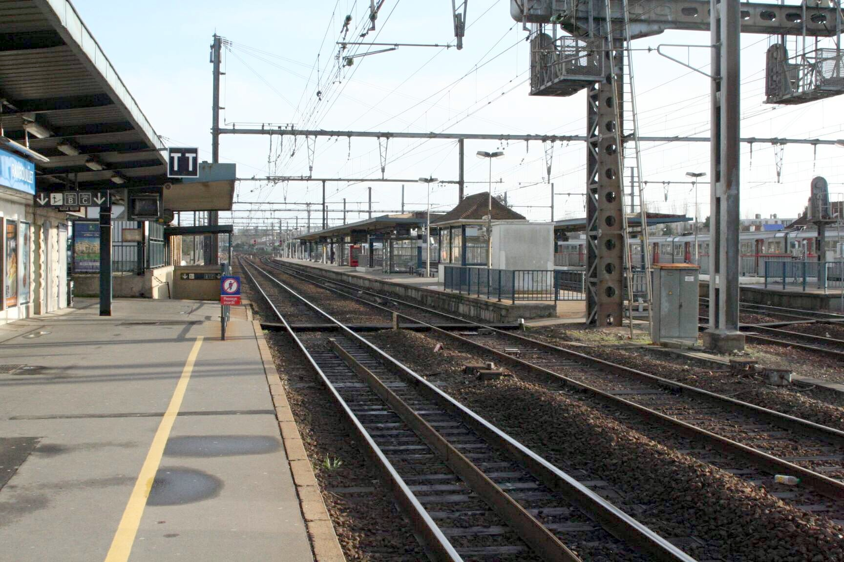 Gare de Rambouillet - Yvelines (France), vue des quais